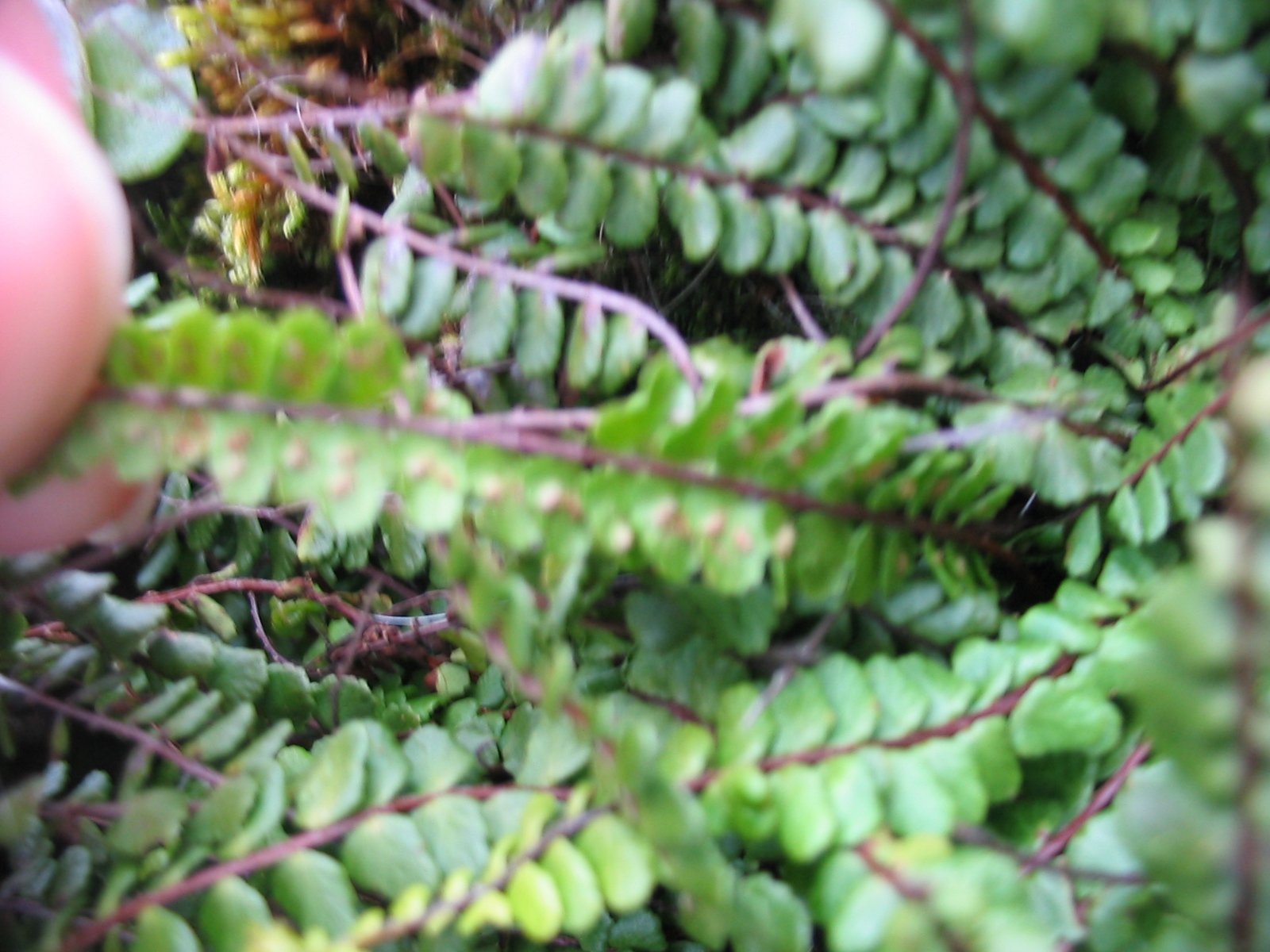 Azoreanischer Strichfarn (Asplenium azoricum) - Spores